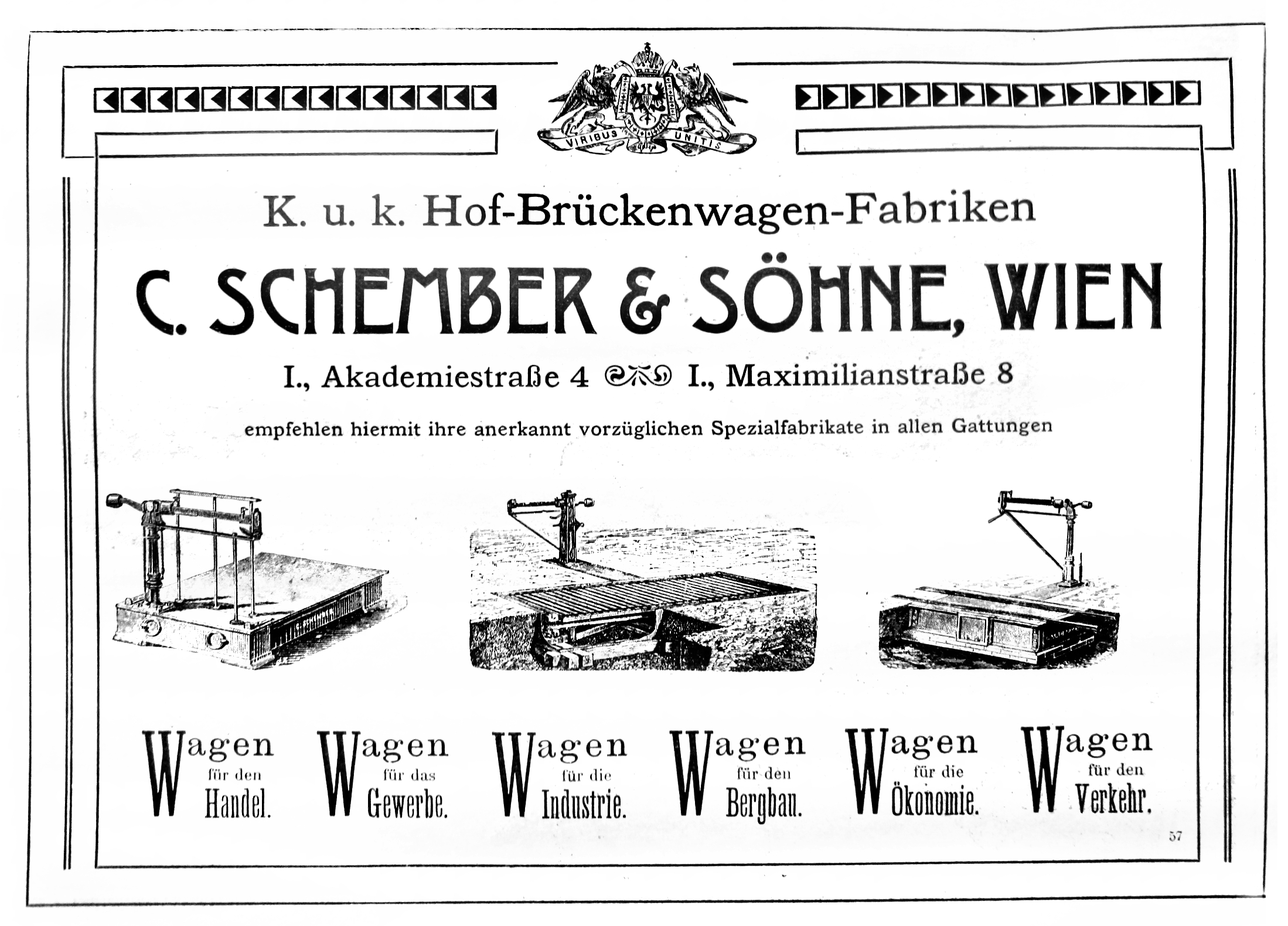 Werbung von C. Schember & Söhne im Hof- und Staats-Handbuch der österreichisch-ungarischen Monarchie für das Jahr 1905.